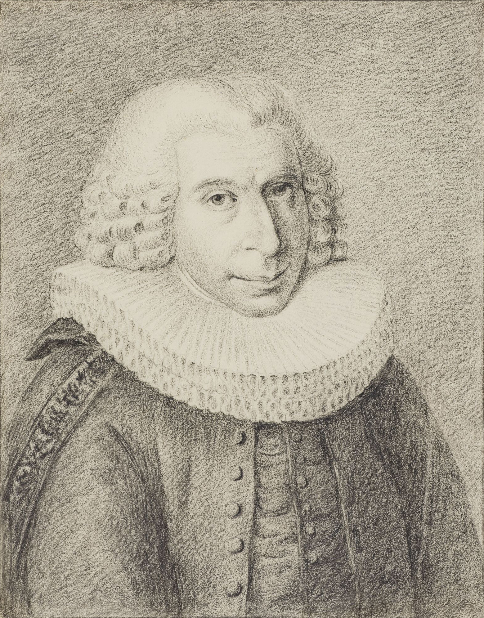 Bildnis von Jakob Schuback, Kohlezeichnung. Unbekannter Künstler. Entstanden vermutlich vor 1785